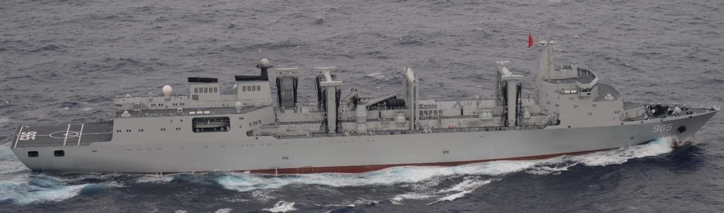 ６月１０日（月）午前７時頃、海上自衛隊第１２護衛隊所属「うみぎり」（呉）、第１１護衛隊所属「やまぎり」（横須賀）及び第１４護衛隊所属「まつゆき」（舞鶴）が、久米島の北西約２７０ｋｍの海域を南東進する中国海軍ルージョウ級ミサイル駆逐艦１隻及びフユ級高速戦闘支援艦１隻の計２隻を確認した。 また、同日午後９時頃、「まつゆき」及び海上自衛隊第５航空群所属「Ｐ－３ Ｃ」（那覇）が、久米島の北西約３５０ｋｍの海域を南東進する中国海軍クズネツォフ級空母「遼寧」１隻、ルーヤンⅢ級ミサイル駆逐艦１隻及びジャンカイⅡ 級フリゲート２隻の計４隻を確認した。 その後、これらの艦艇が沖縄本島と宮古島の間の海域を南下し、太平洋へ向けて航行したことを確認した。 なお、フユ級高速戦闘支援艦は、海上自衛隊として初めて確認したものである。